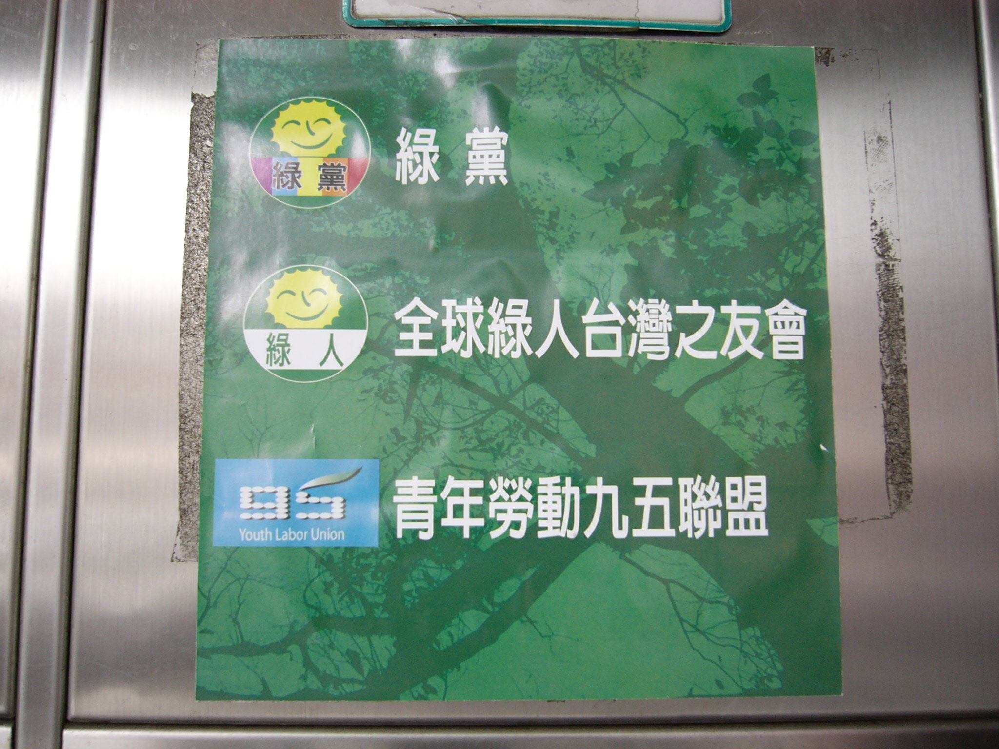 臺北市中正區忠孝東路一段，台灣綠黨、全球綠人台灣之友會、青年勞動九五聯盟合用總部。現在三者均已搬離。